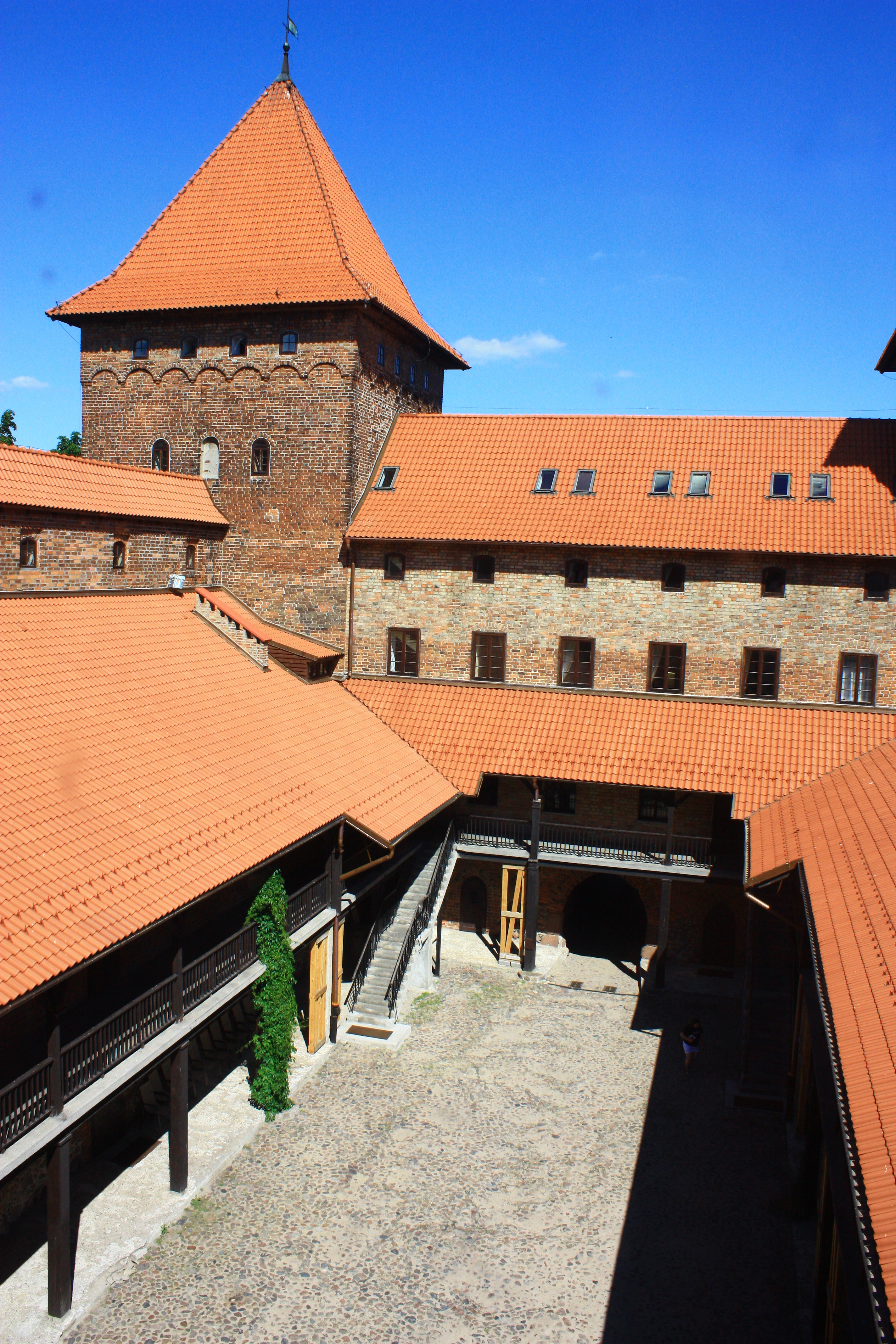 Nidzica, zamek, ob. hotel, pocz. XIV, XIX, po 1945